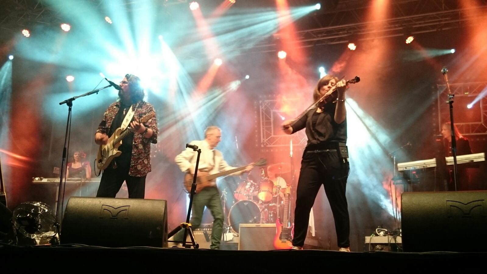 Electric Light Orchestra beim Stadtfest Bunter Hering in Frankfurt (Oder) 2015